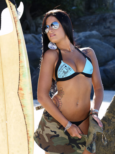 Modelo: Aline Campos Makeup: Luciene Rosas Trabalho para o Portal PS embreve no site.